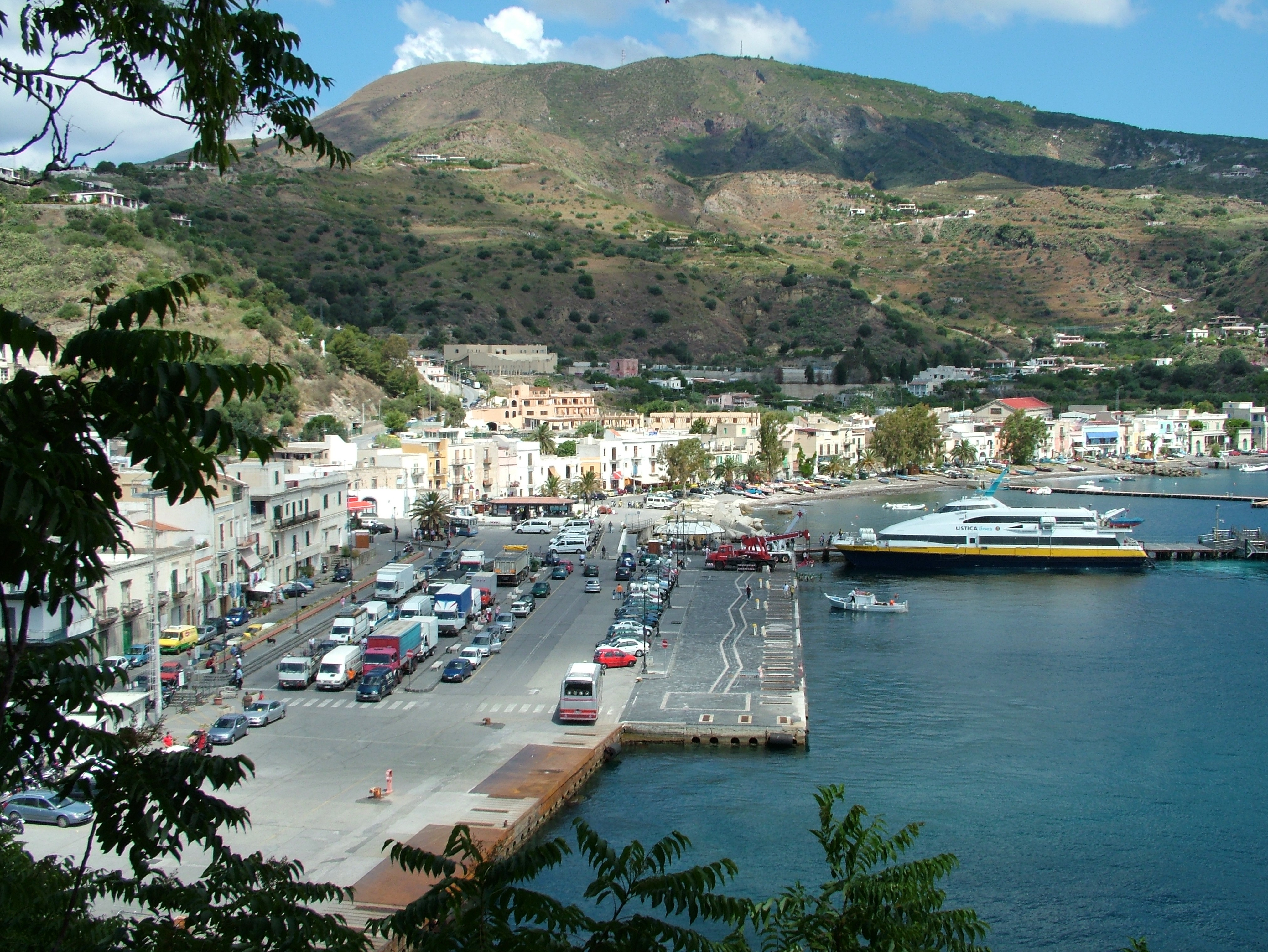 Lipari, Fährhafen der Stadt (nördlich von Sizilien)